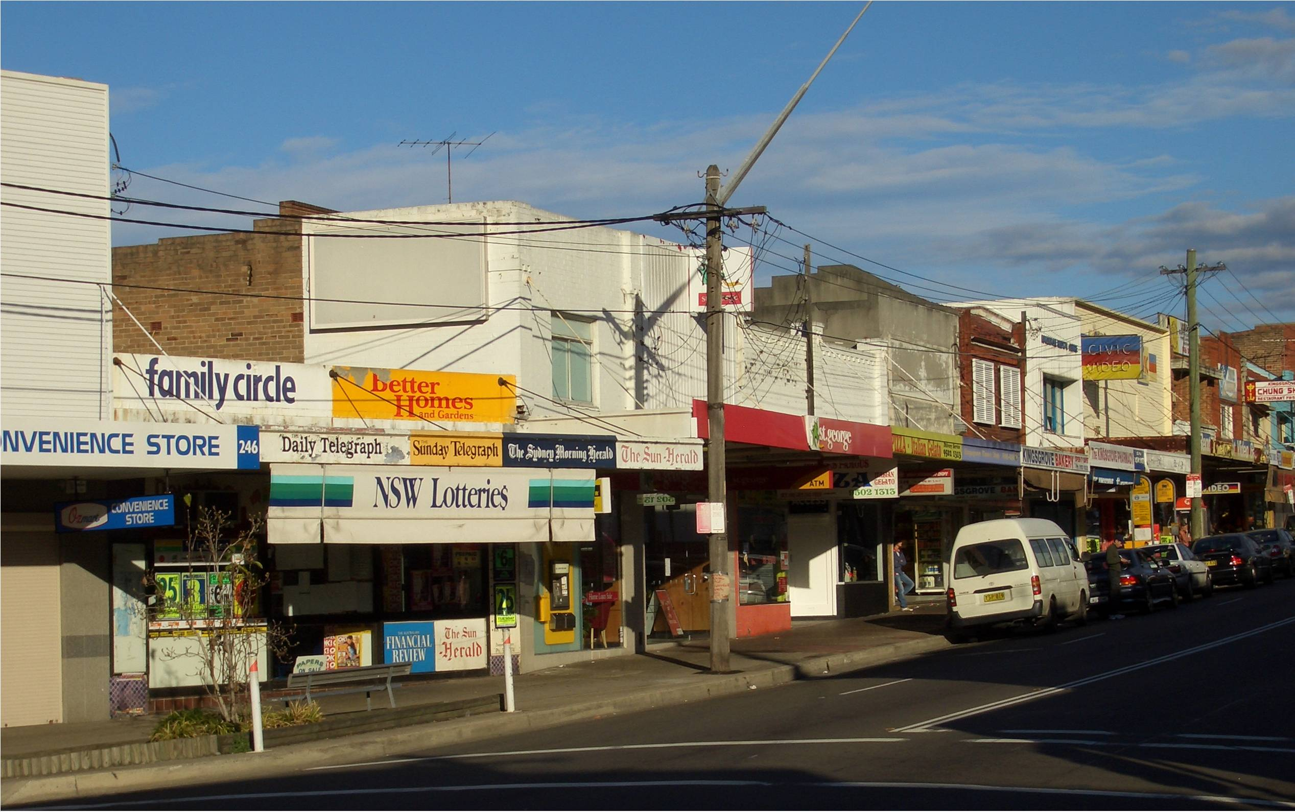 Kingsgrove Road, Kingsgrove, Sydney